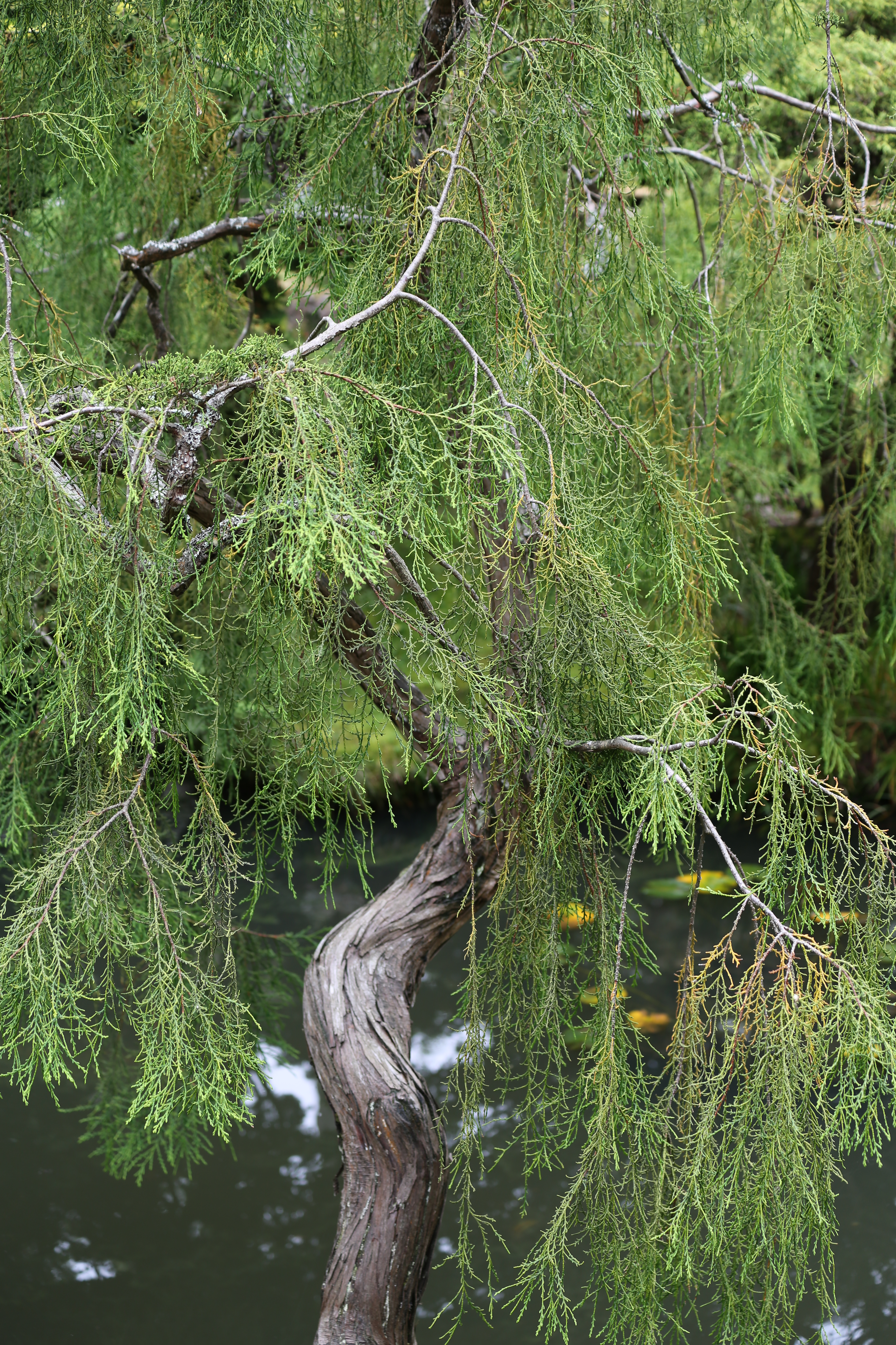 Japanese Tea Garden (San Francisco) (TK2)